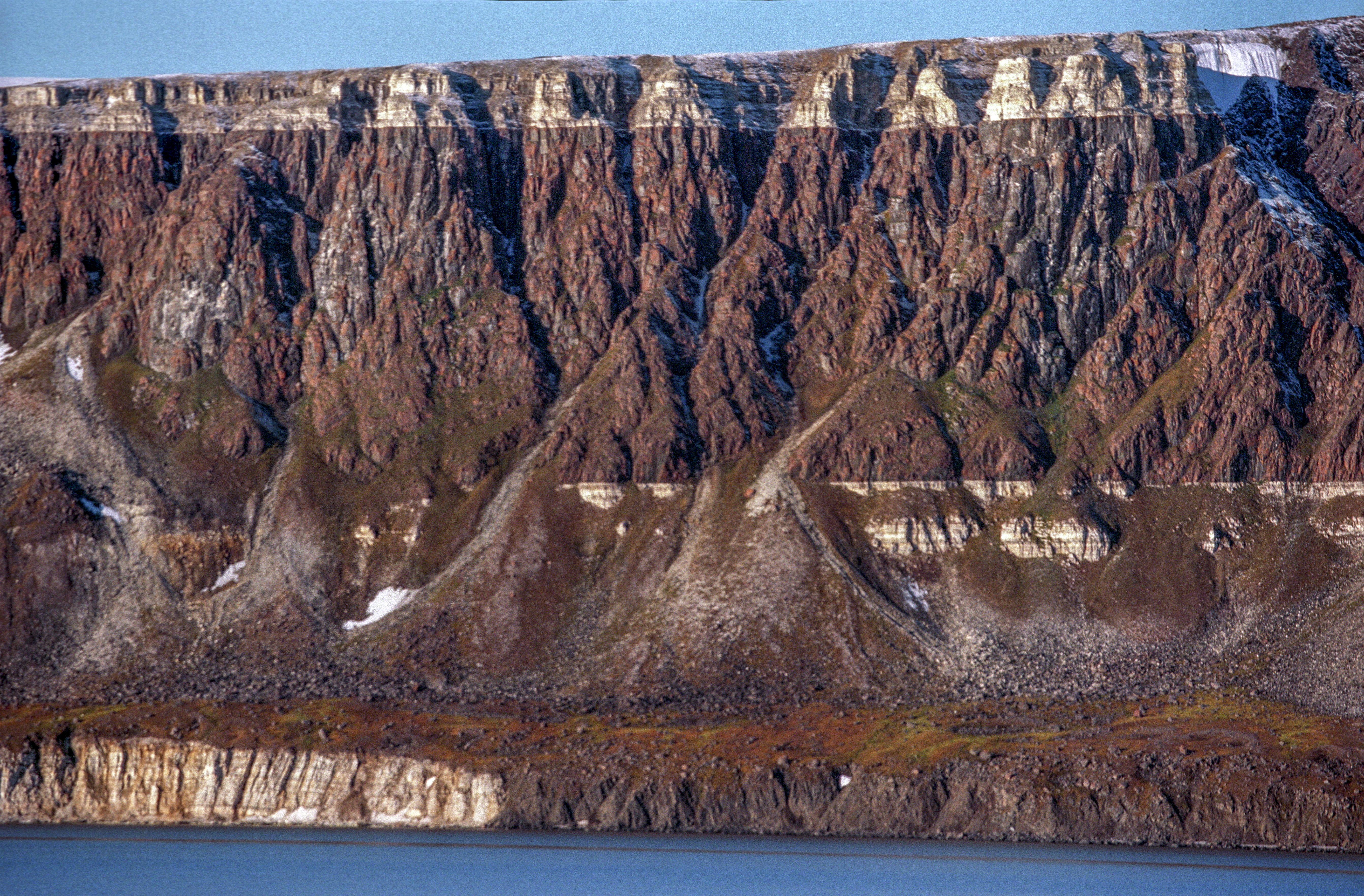 Spitsbergen, Cape Fanshaw